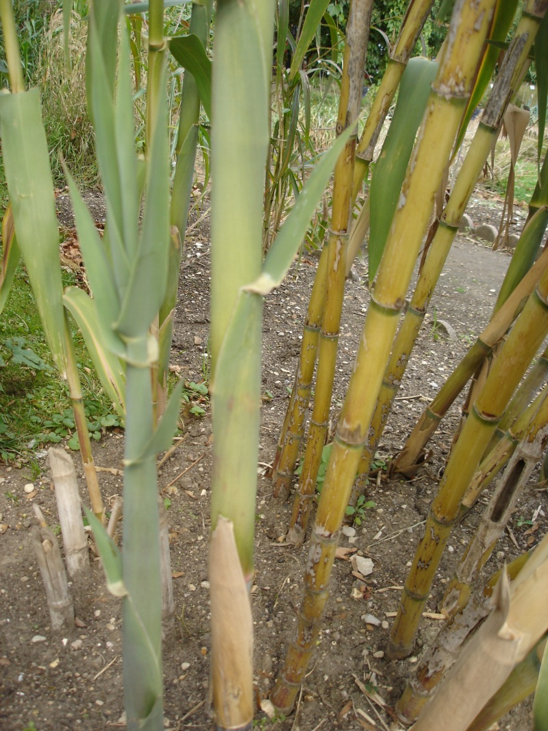 Arundo donax, Jardin des Plantes de Paris